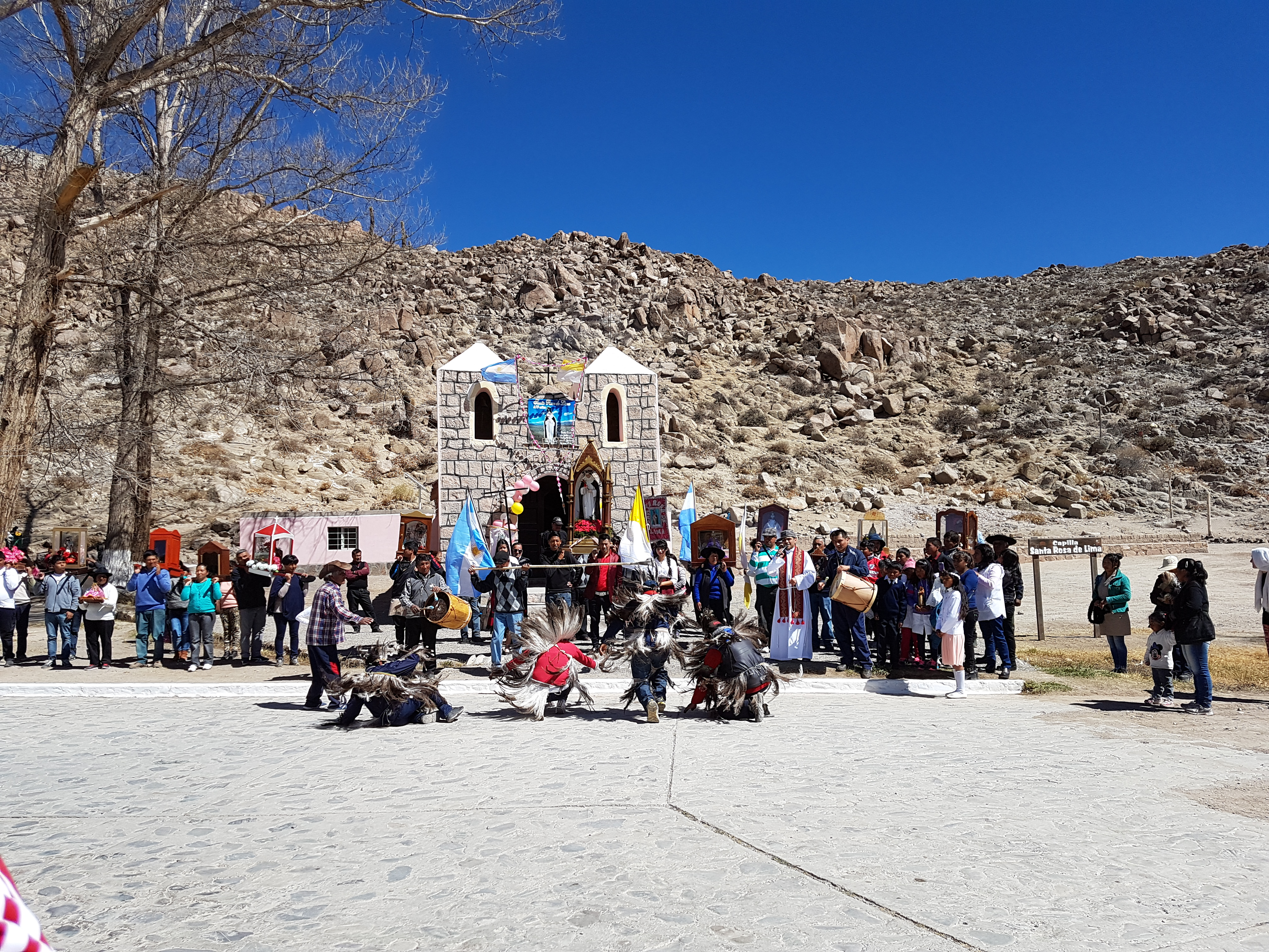 monumento cultural. Lugares